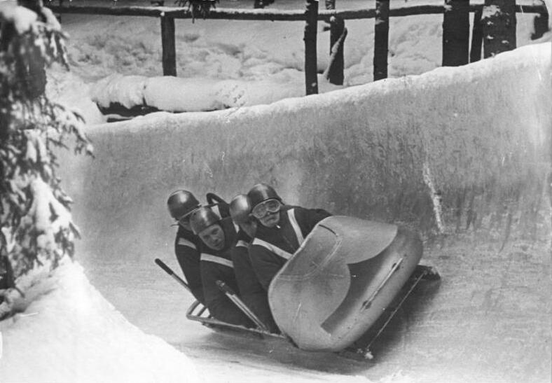 Bob Hohmann Zentralbild Wendorf - Wlocka Wen-Ni. 19.2.1956 VII. DDR-Wintersportmeisterschaften in Oberhof Am Vormittag des 18.2.56 fand auf der Wadeberg-Bobbahn in Oberhof das Training der Viererbobs statt. UBz: Die Mannschaft des SC Motor mit Steuermann Hohmann im Labyrinth der Wadeberg-Bobbahn.